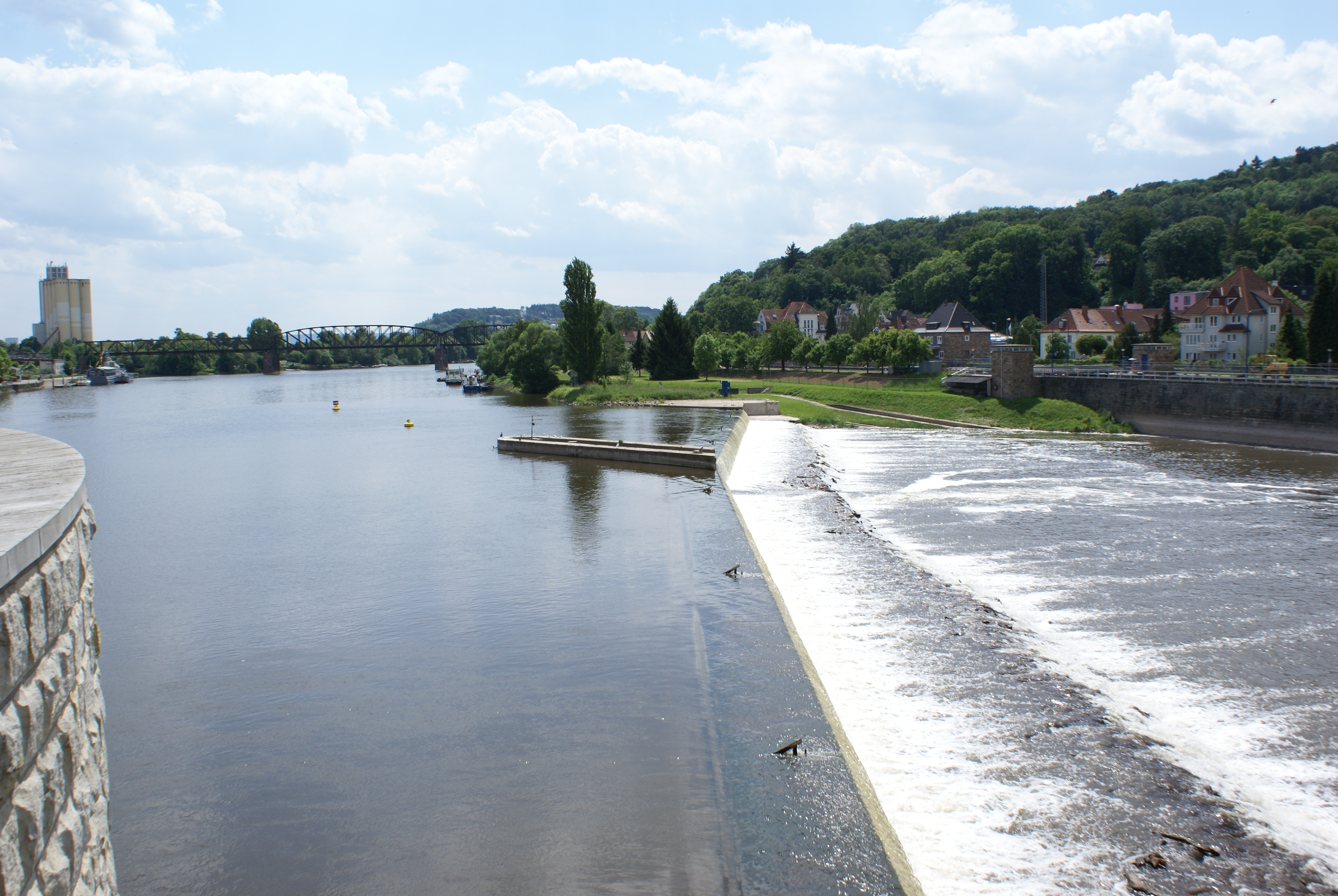 Weserwehr - Hameln